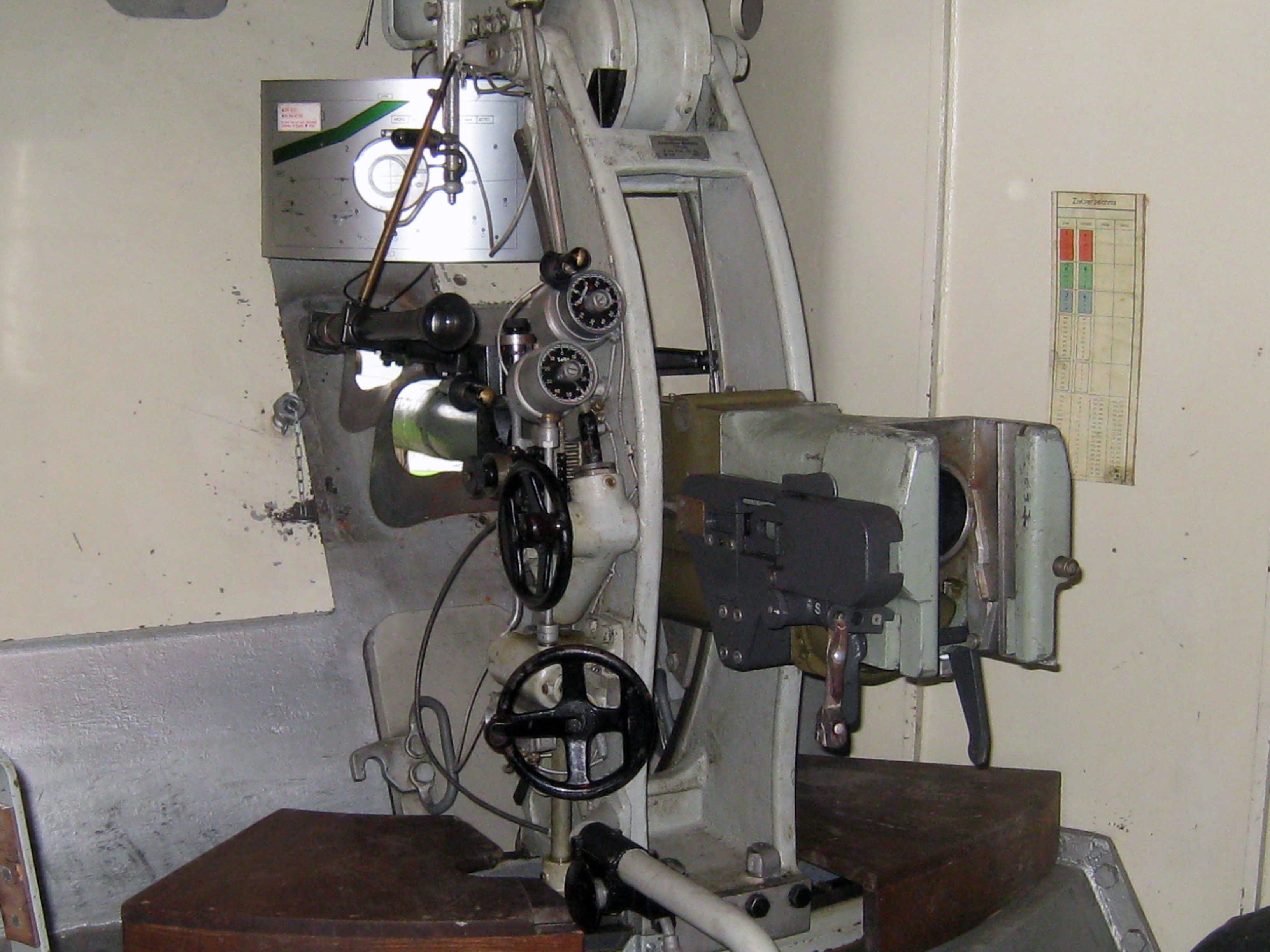 Infanteriewerk A 7838 in Sufers, Kanton Graubünden: Geschütz von innen